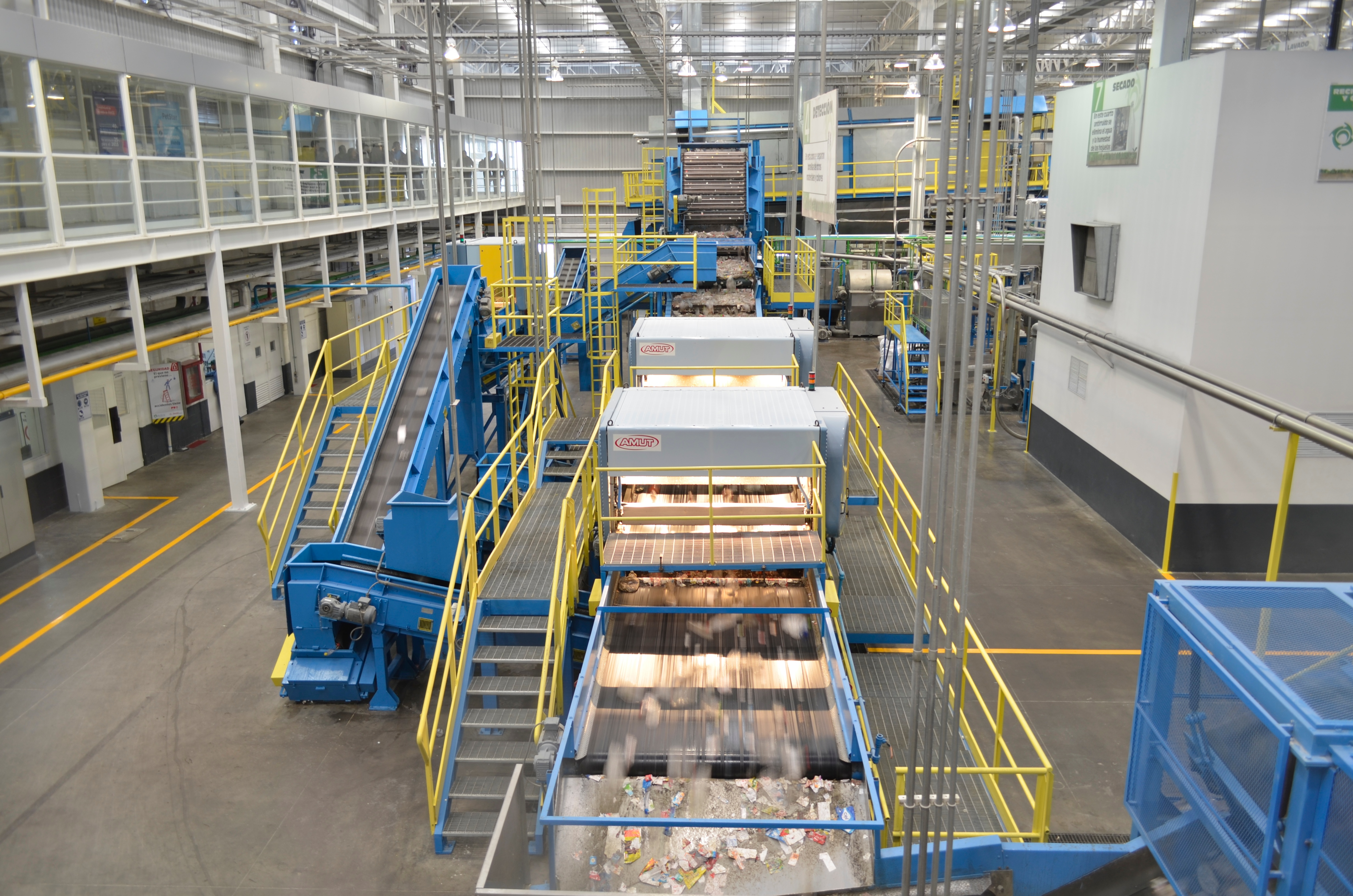 En esta zona se lleva a cabo el proceso de detección de materiales para transformarles en resina reciclada de PET grado alimenticio de la más alta calidad.